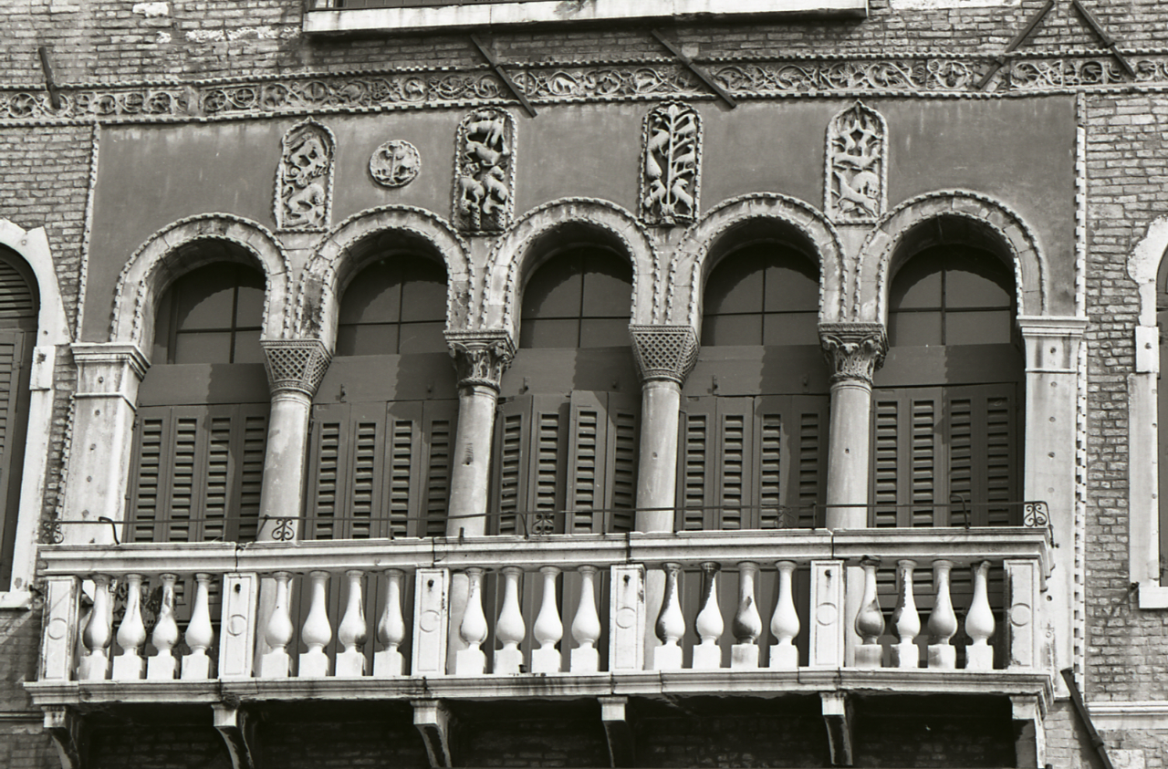 Serie fotografica : Venezia, 1969 / Paolo Monti. - Strisce: 7, Fotogrammi complessivi: 35 : Negativo b/n, gelatina bromuro d'argento/ pellicola ; 35 mm. - ((I fotogrammi hanno una doppia numerazione. . - Sul portanegativi: Nikon Pan F. - All'interno del portanegativi Monti specifica alcuni soggetti. - Fonte: Agenda di Paolo Monti: Monti - Agenda 1969 (1969), presso Archivio Paolo Monti